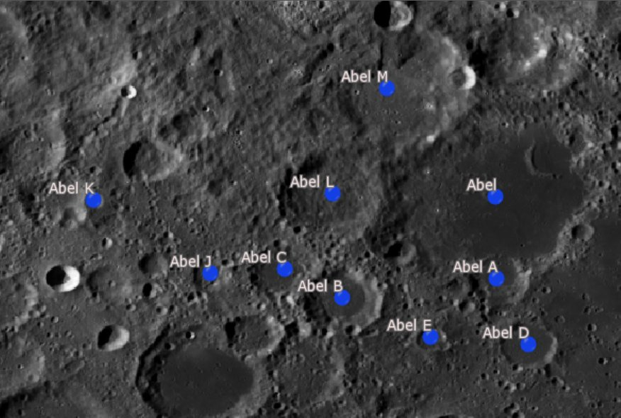 Cráter lunar Abel. Cráteres satélite.(Imagen LRO)